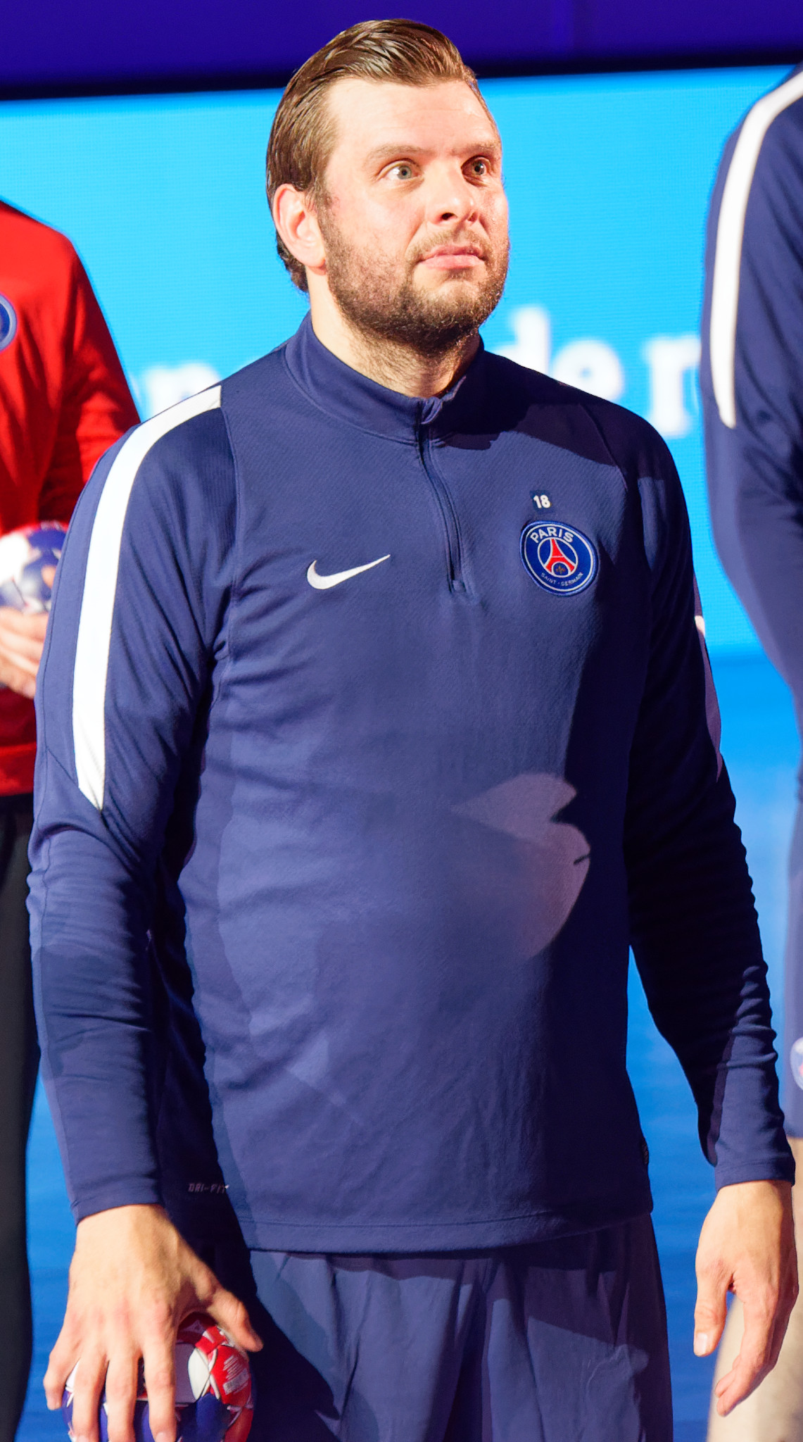 Rencontre de championnat entre le PSG et Pays d'Aix handball. A Coubertin, le 2 juin 2016.